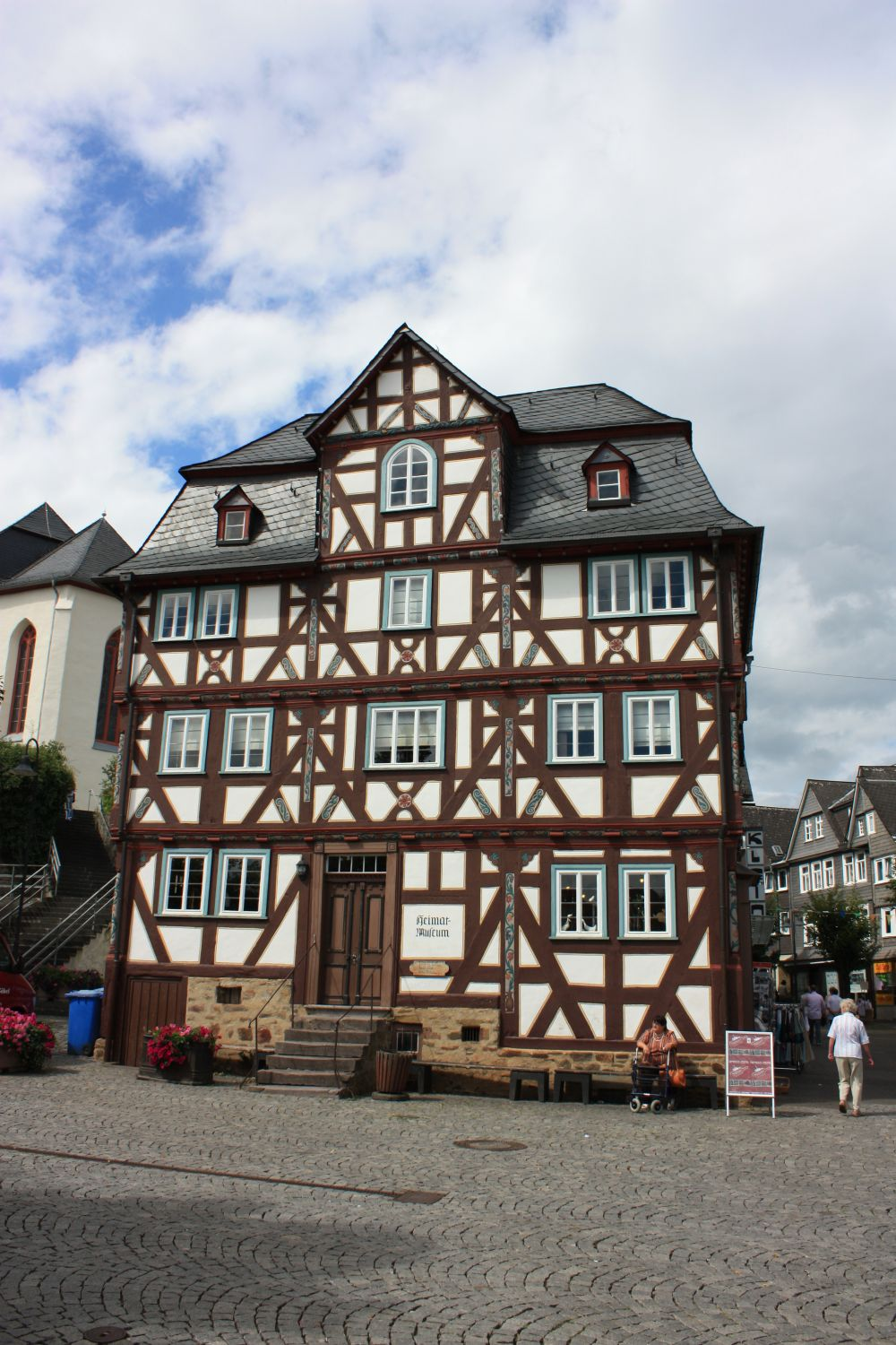 Heimatmuseum Haiger, Hessen, Deutschland im ‚Haus Fischbach‘(errichtet 18. Jahrhundert)